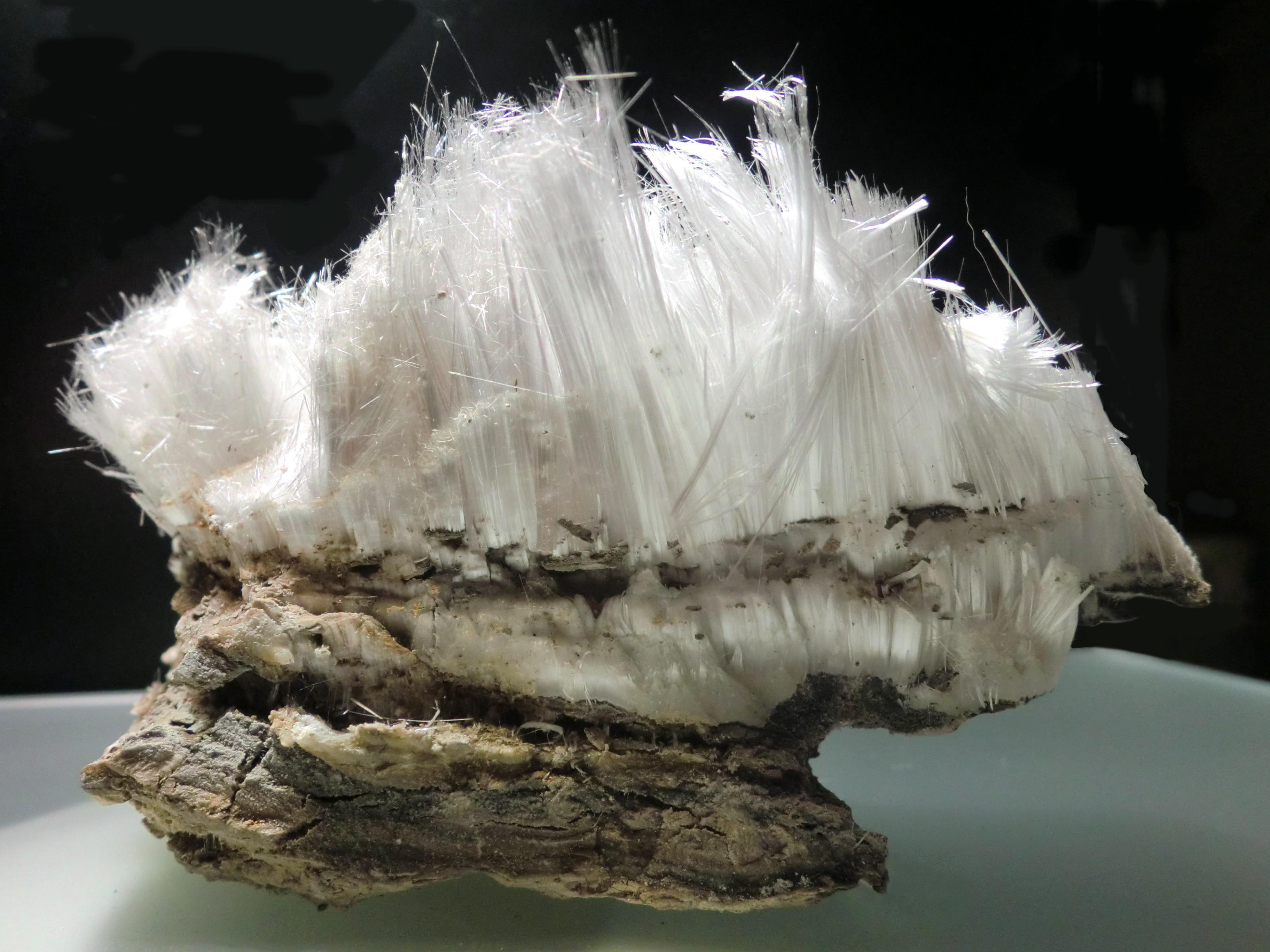 Cristales aciculares de epsomita - Cueva de la Llave de Catatayud (Zaragoza, España).